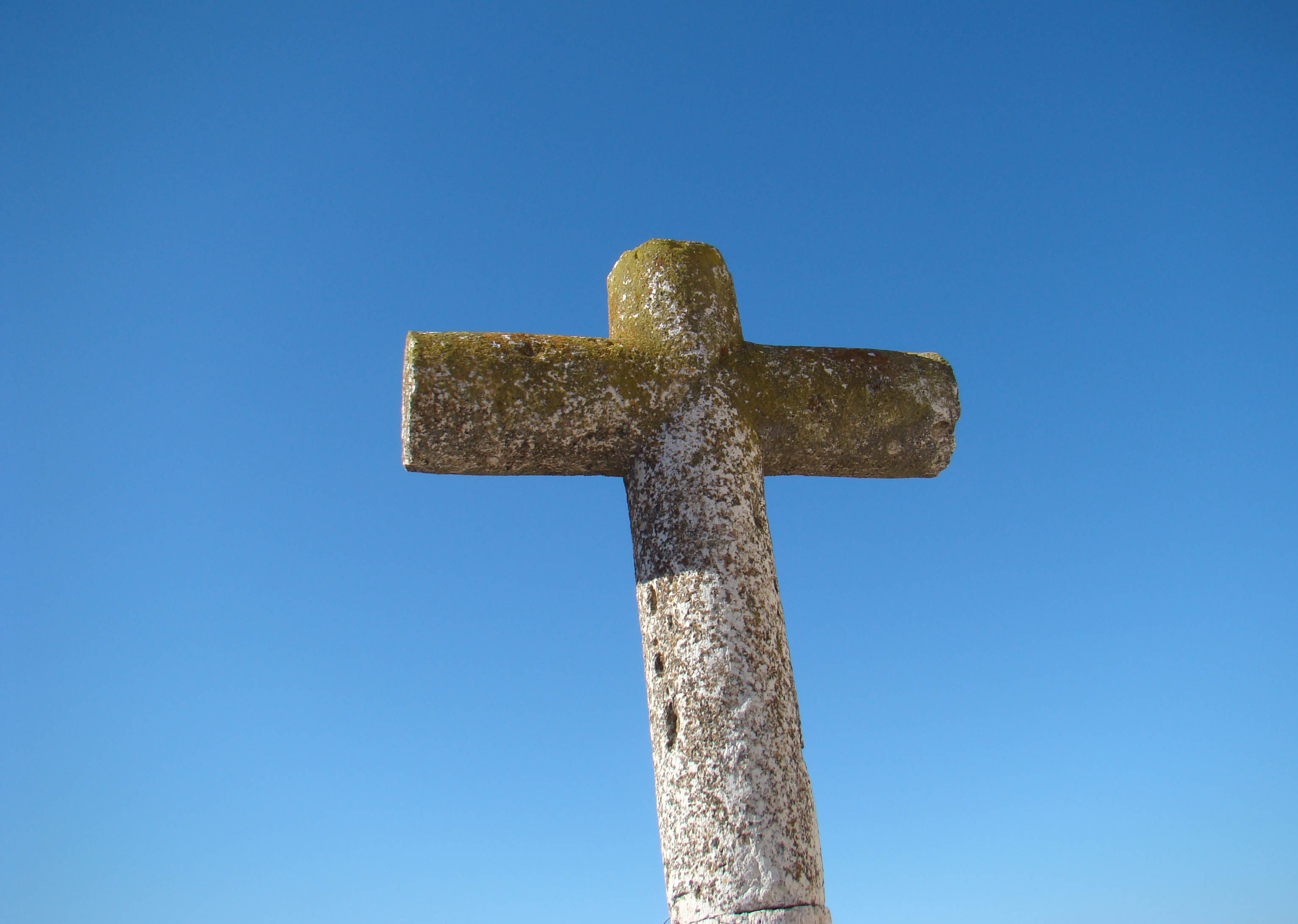 Moraleja de las Panaderas en la provincia de Valladolid, España. Cruz de piedra que se encontraba elante de la desaparecida ermita de Santa Ana.